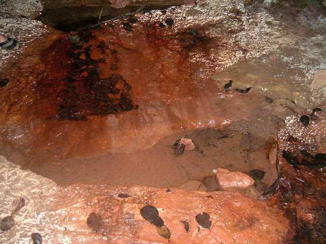 Interior de la Cueva de la Reina, en Betulia, Santander, Colombia Imagen tomada en julio de 2004. No viola ninguna política de copyright Licencia